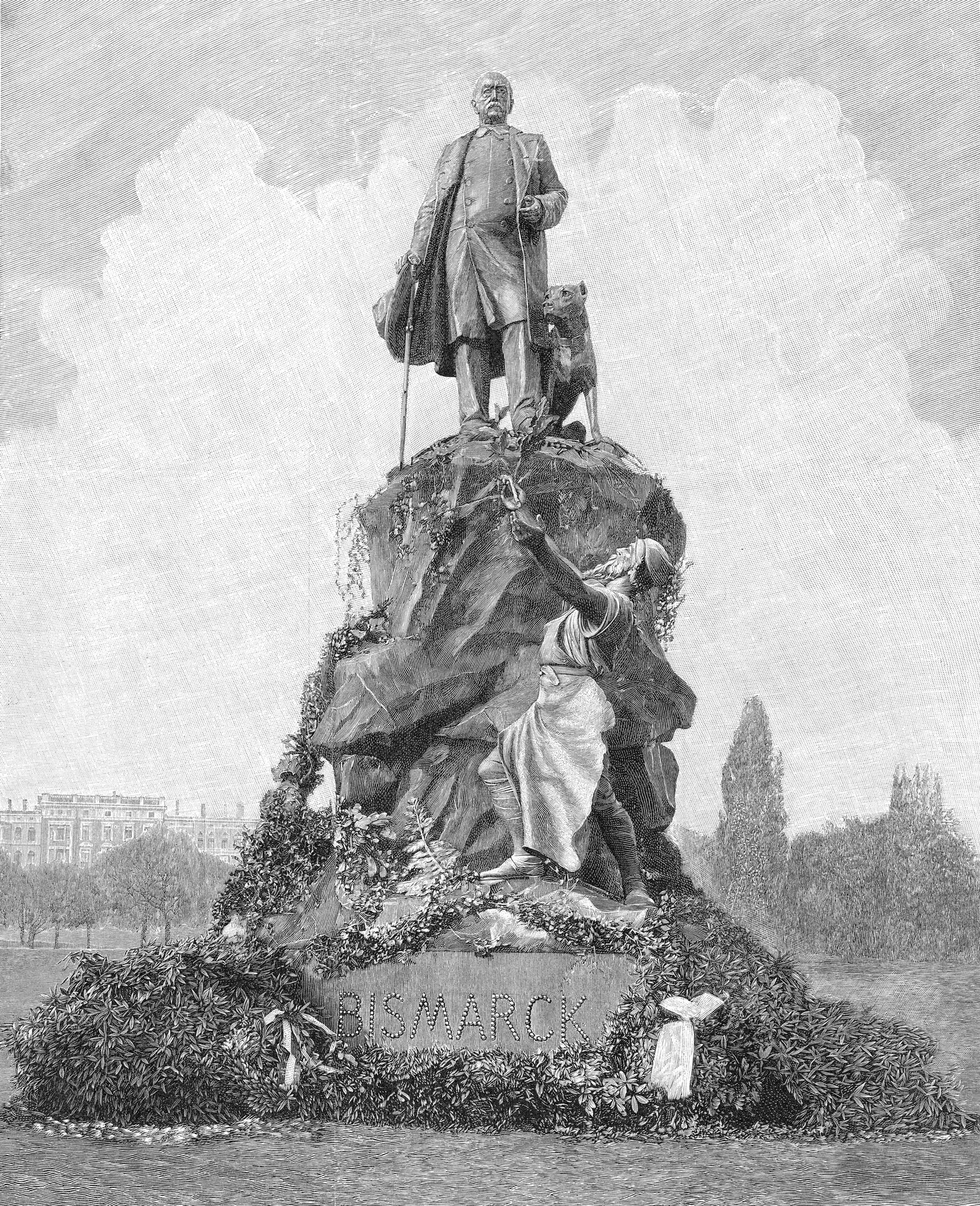 Das am 18. October enthüllte Bismarck-Denkmal in Leipzig. Modellirt von Adolf Lehnert und Joseph Magr. Nach einer photographischen Aufnahme von Otto Roth in Leipzig-Connewitz (originale Bildunterschrift)